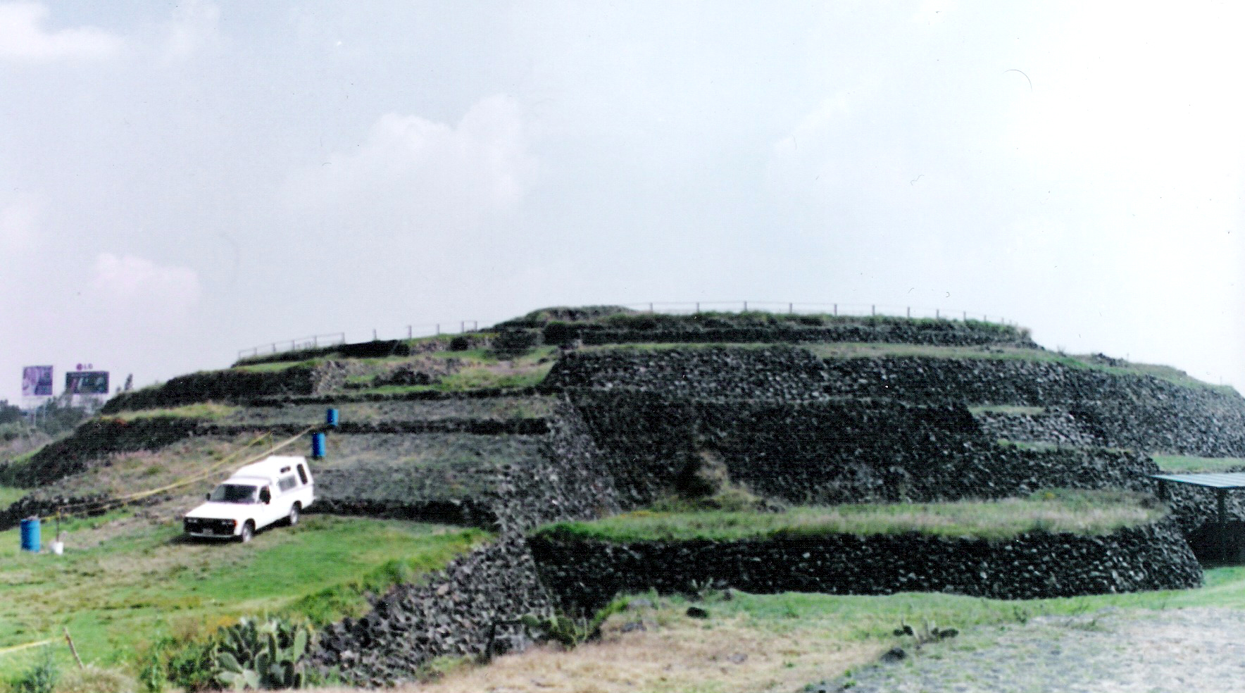 esta es una foto de la piramide de cuicuilco tomada desde el frente